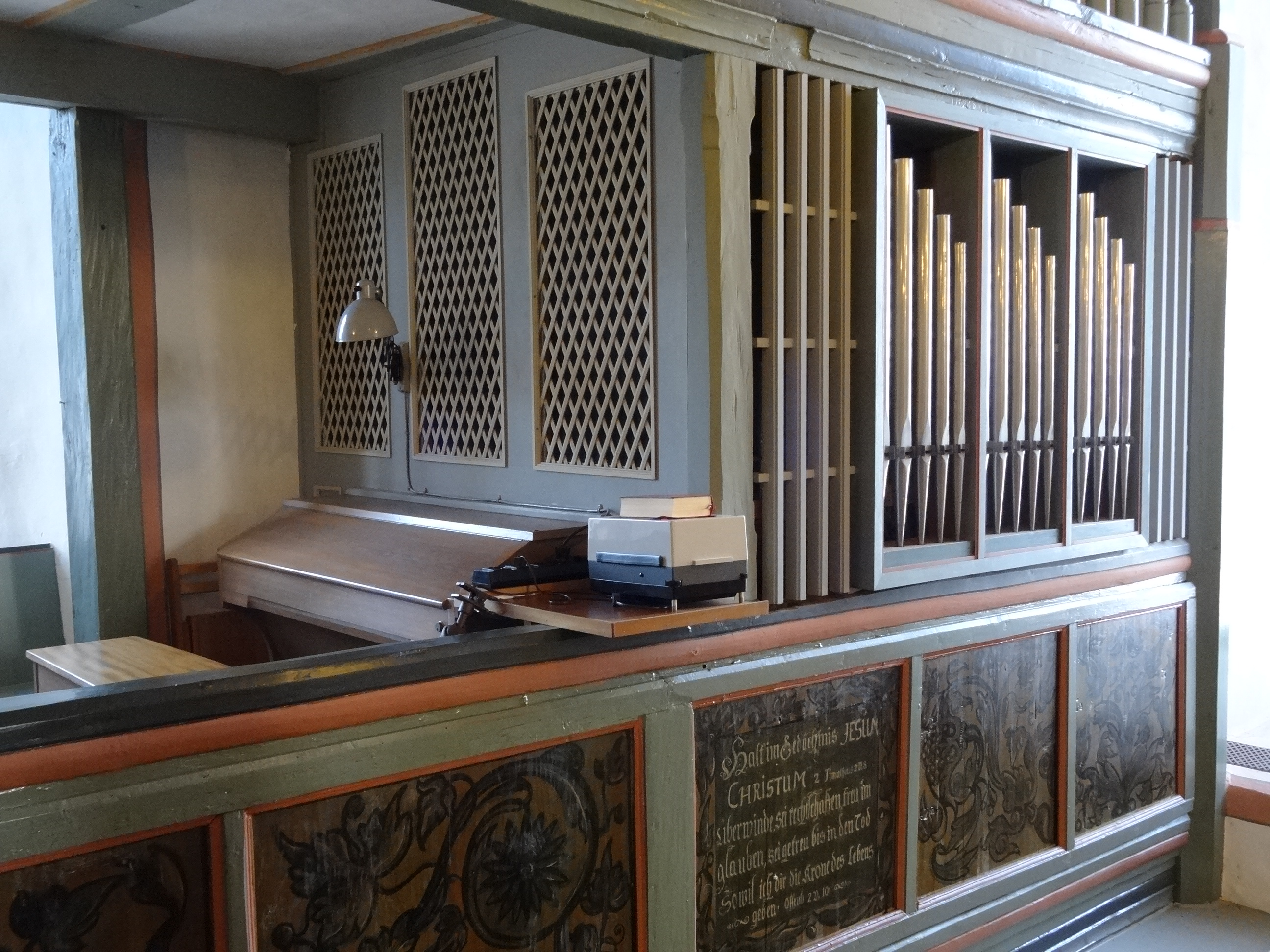 Evangelische Katharinenkirche Gleiberg